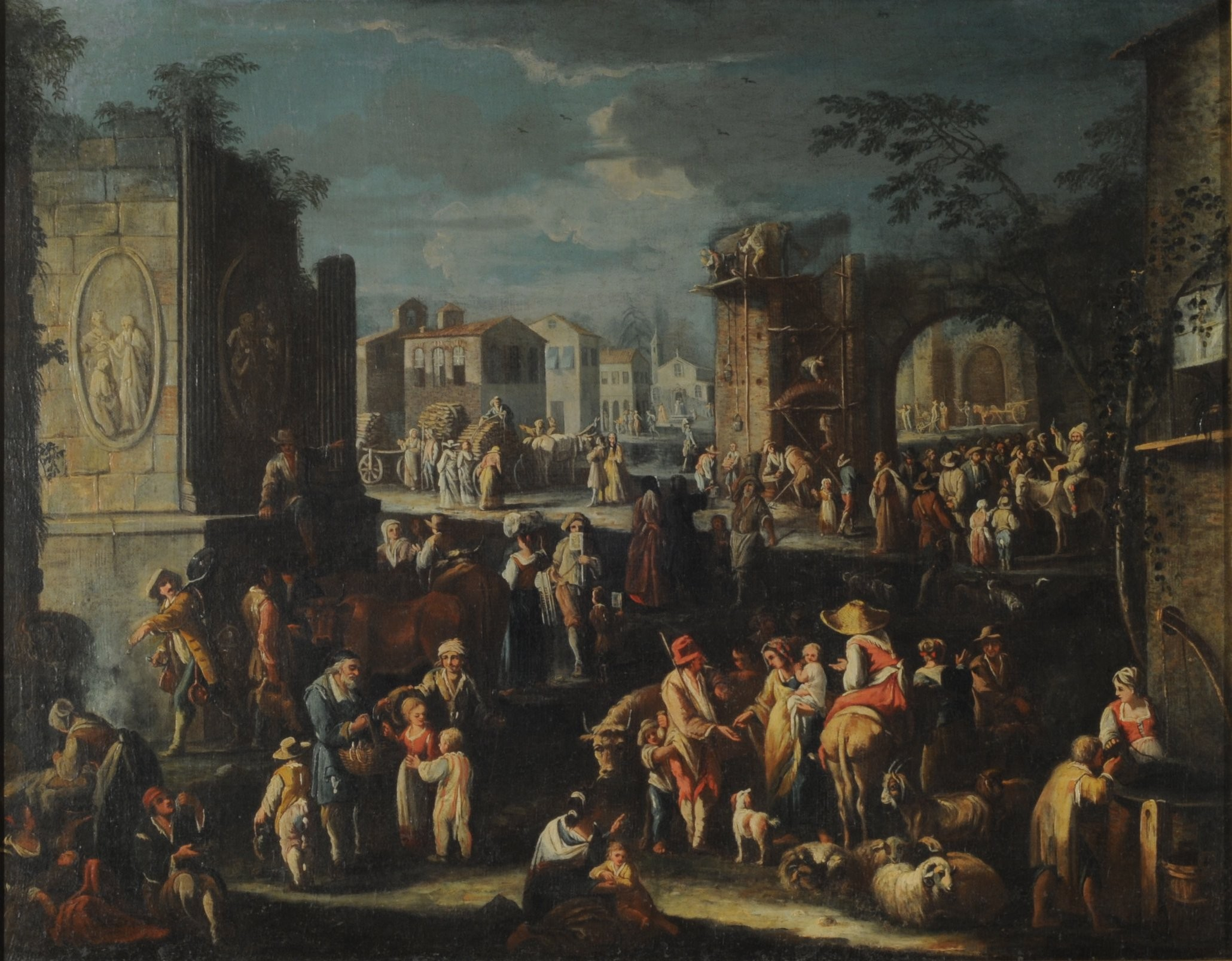 Giovanni Michele Graneri, Ferias italianas (Tit. Ant.: Costumbres genovesas del año 1652). S. XVIII. 77 x 98 cm, con marco: 91 x 111 cm, óleo sobre tela. Inv. 5536.